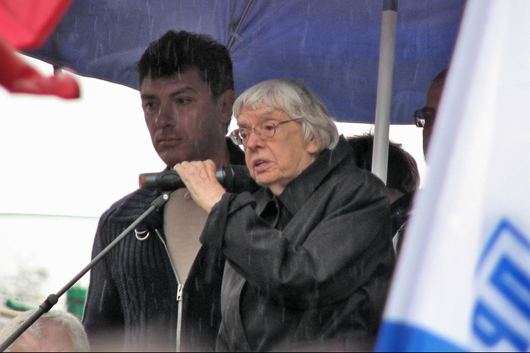 Фоторепортаж с митинга памяти Анны Политковской, состоявшегося в Москве, в Новопушкинском сквере 7 октября 2007 года.